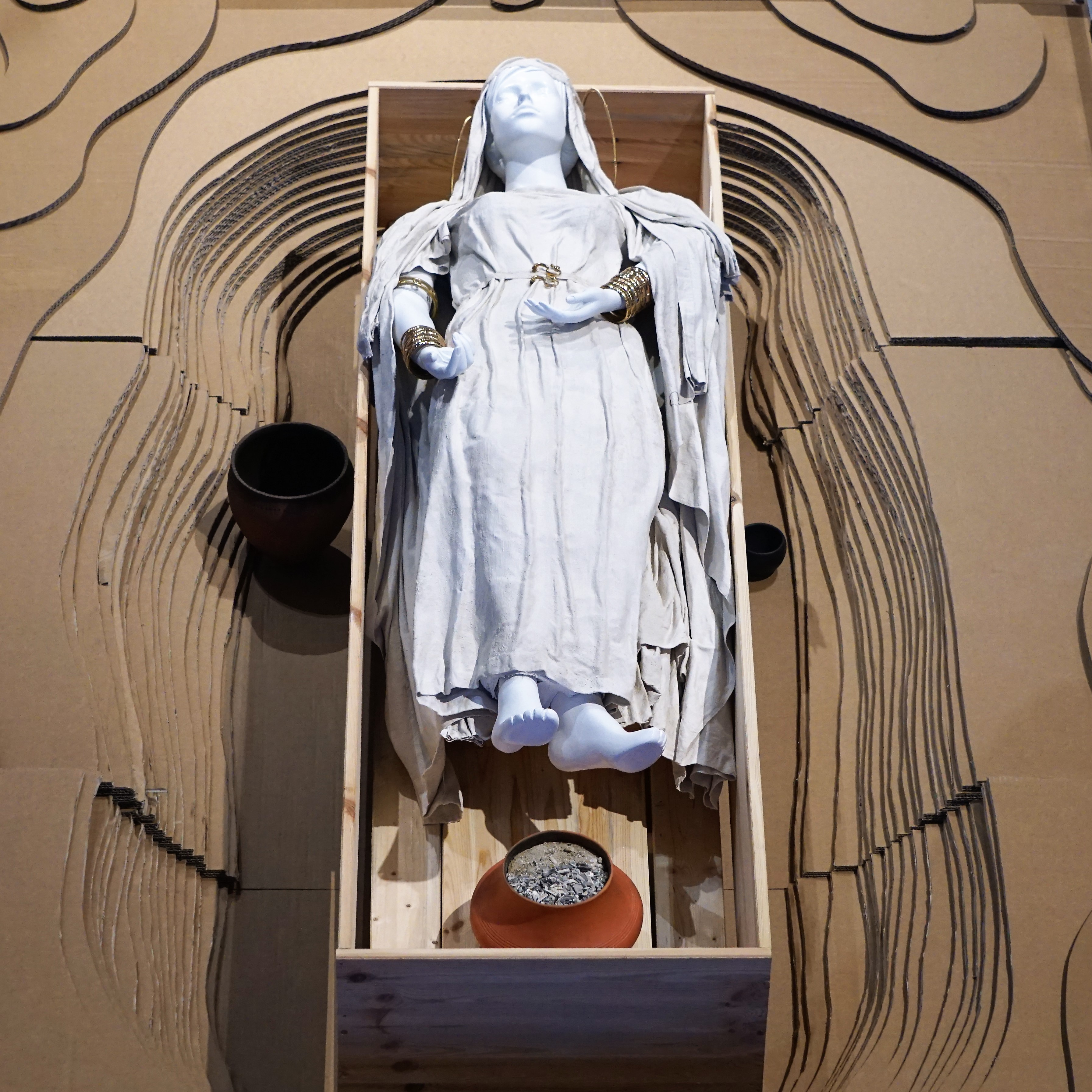 La dame de Schengen: Reconstitution de la tombe 17. Fosse sépulcrale avec évocation grandeur nature de l'inhumée, fac-similés des bijoux en métal et répliques céramiques.